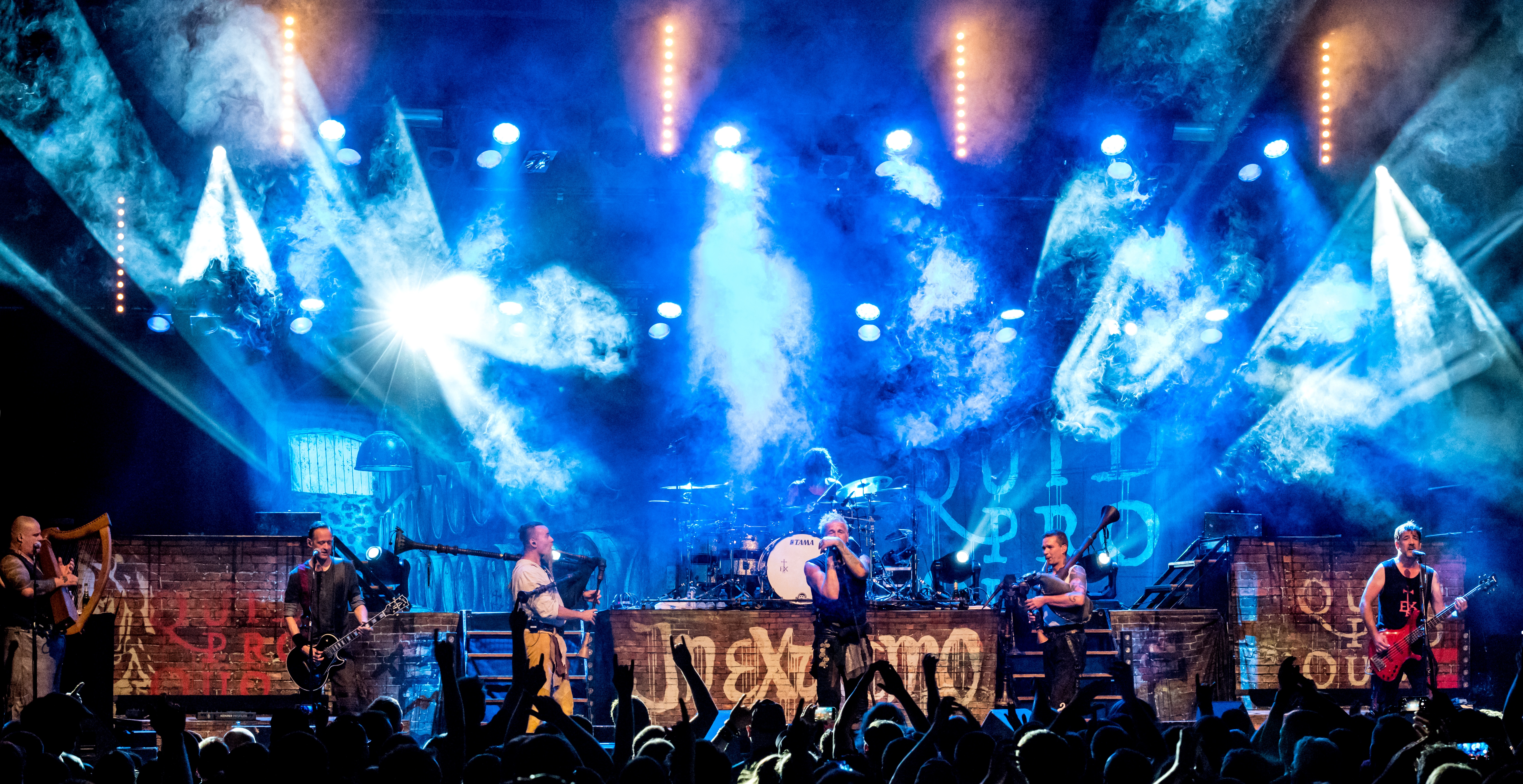 Bilder vom Zelt Musik Festival 2018 in Freiburg im Breisgau In Extremo am 29.07.2018 im Zirkuszelt